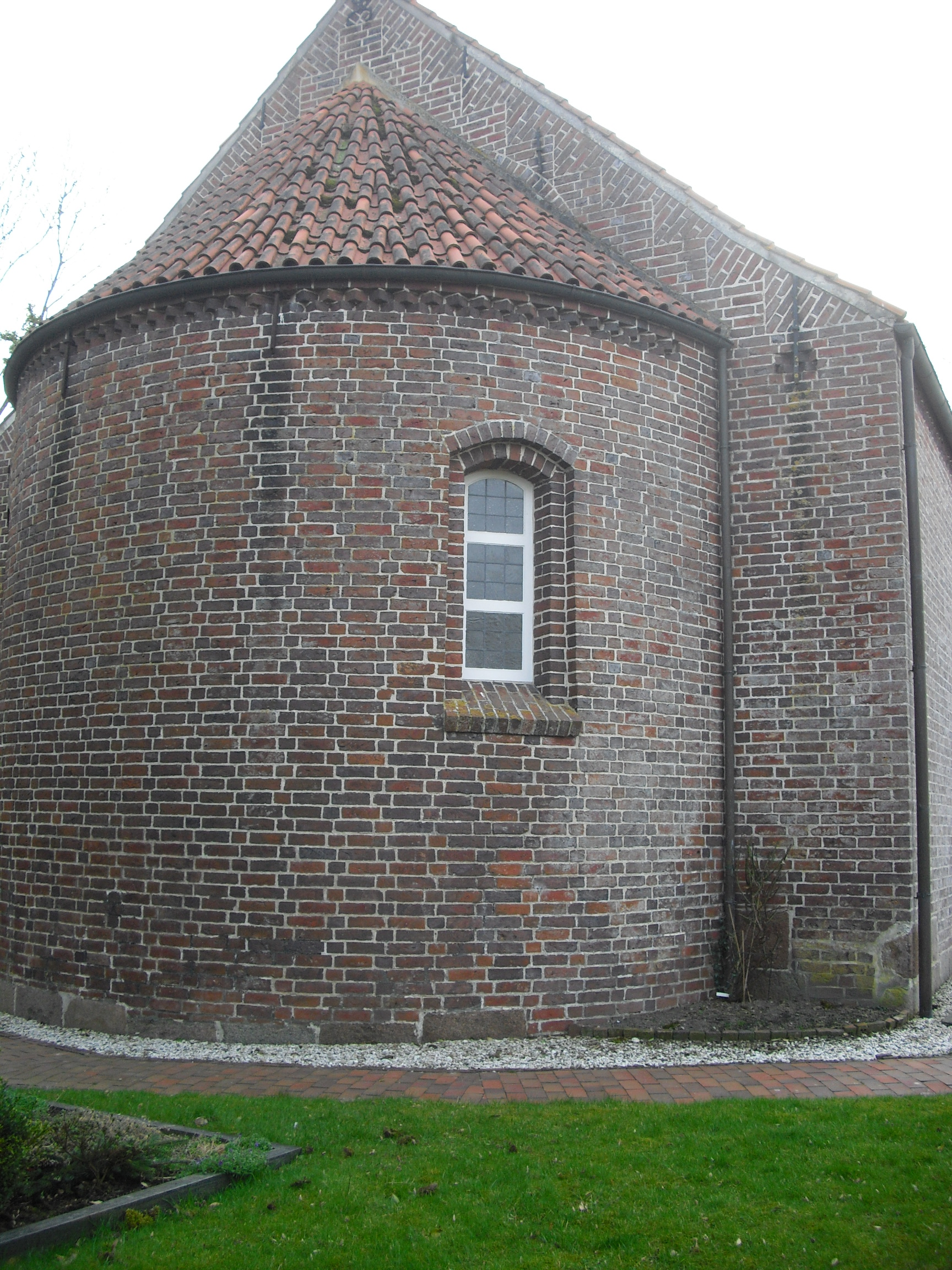 Ostseite der St.-Elisabeth-Kirche Wangerland-Westrum